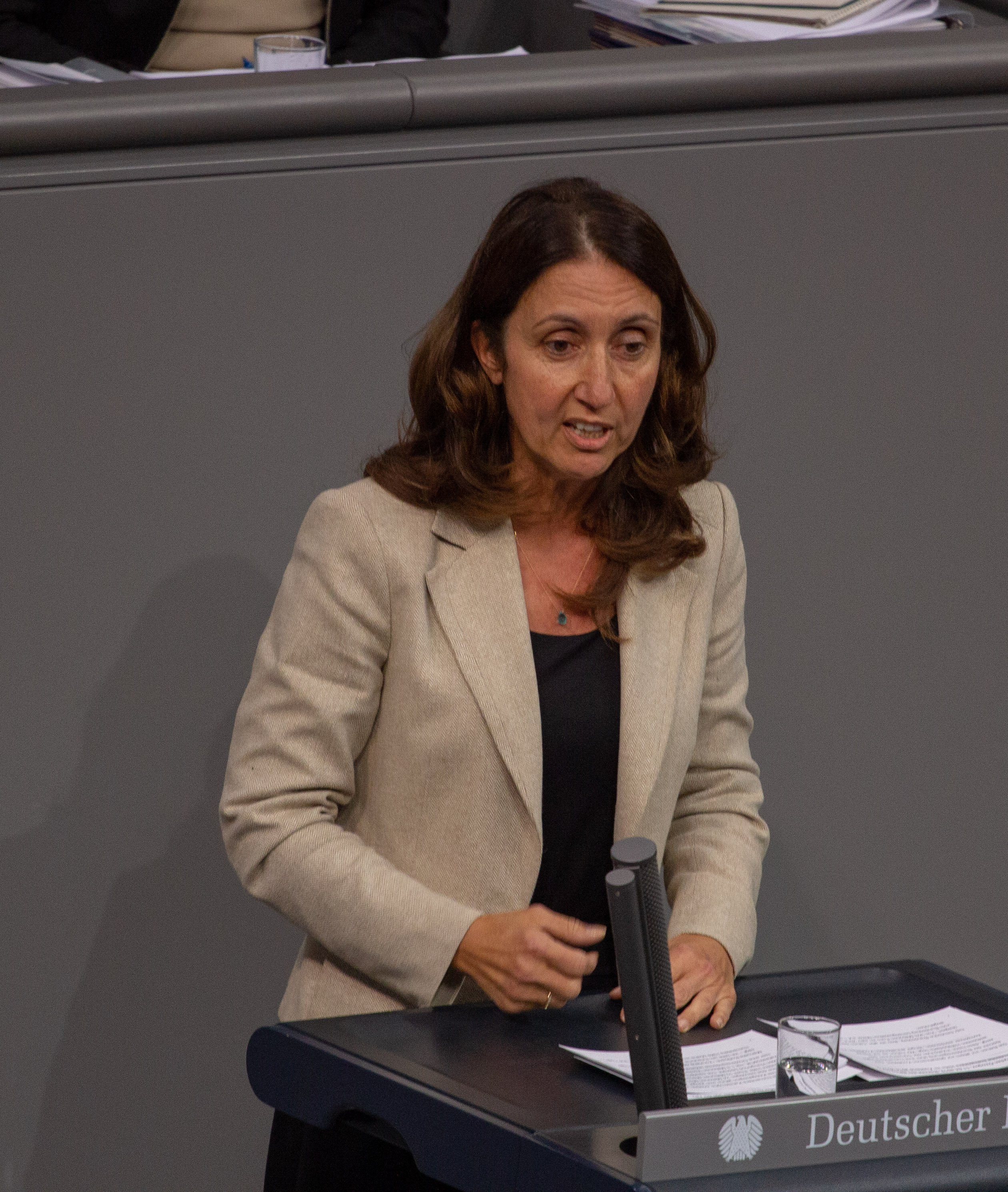 Aydan Özoğuz, Mitglied des Deutschen Bundestages, während einer Plenarsitzung am 11. April 2019 in Berlin.